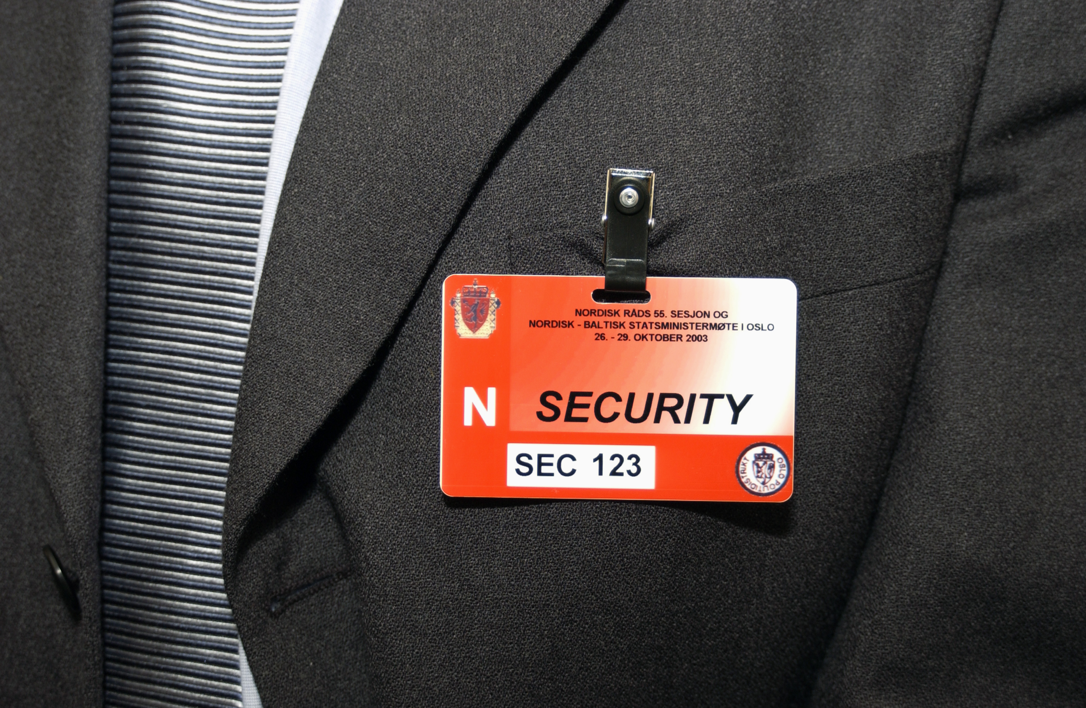 Norska polisen ansvarar för säkerheten. (Bilden är tagen vid Nordiska rådets session i Oslo, 2003)